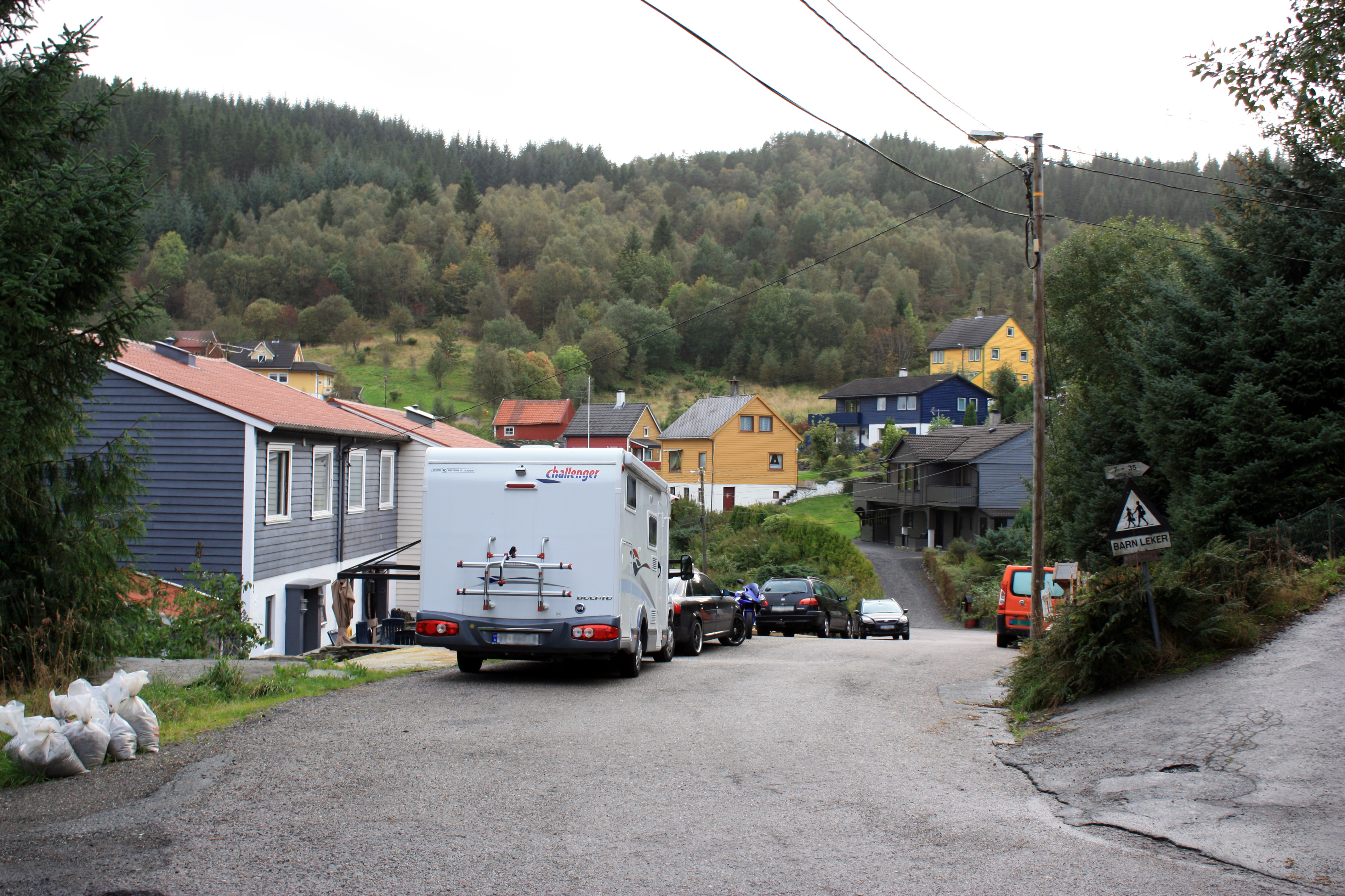 Vestre Vallavegen, Fana, Bergen.